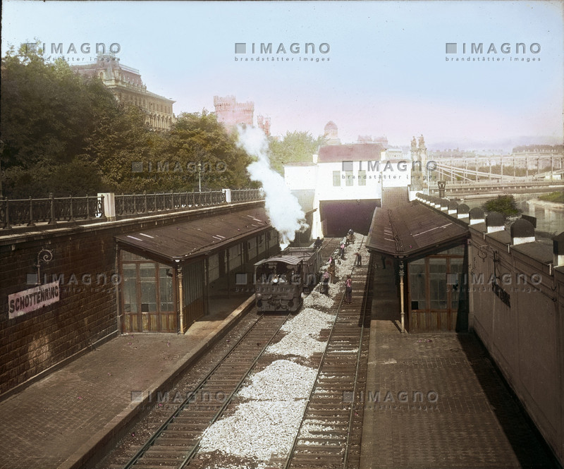 Wiener Elektrische Stadtbahn, Haltestelle Schottenring